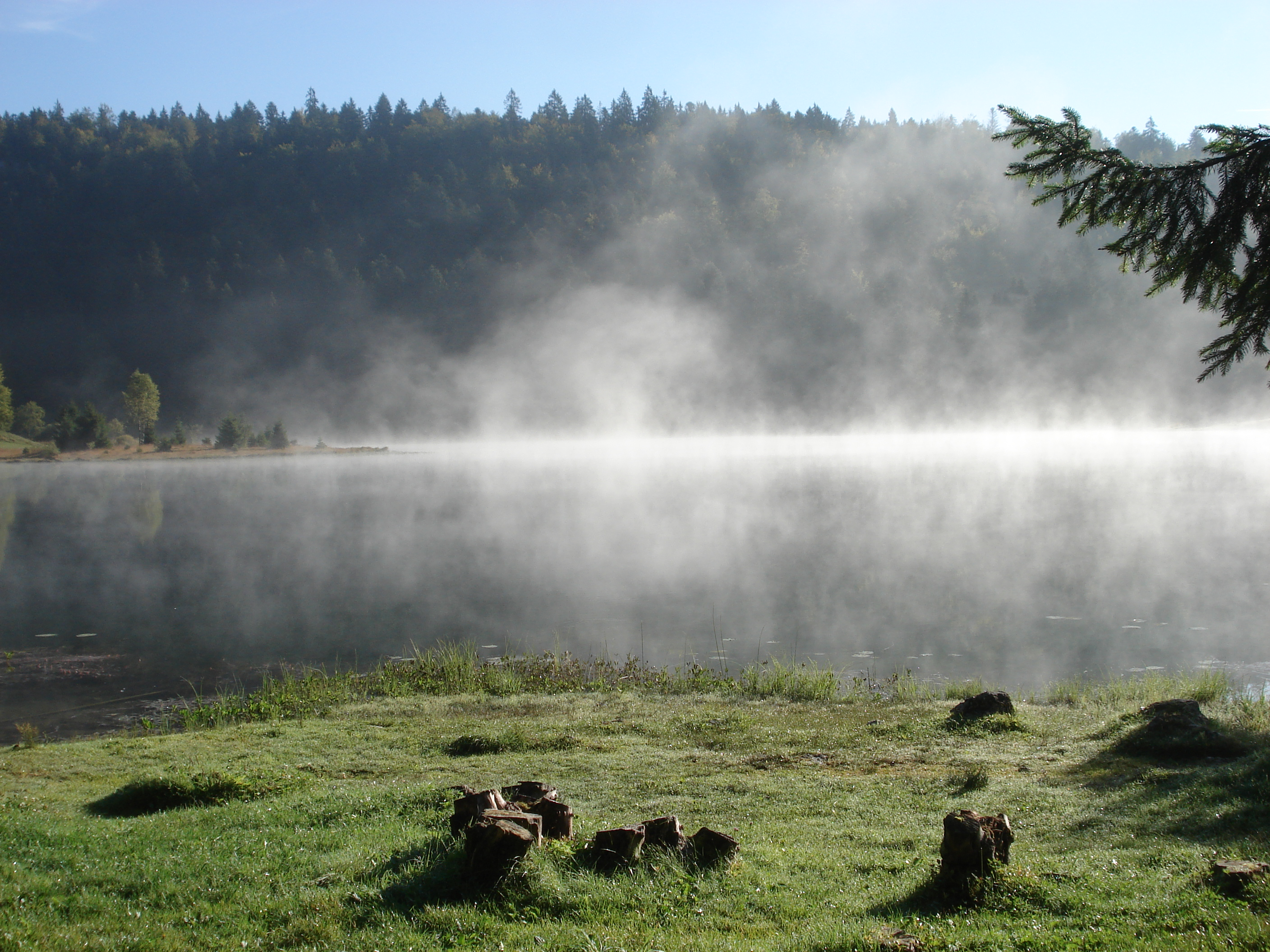 Morgendunst über dem Lac Genin